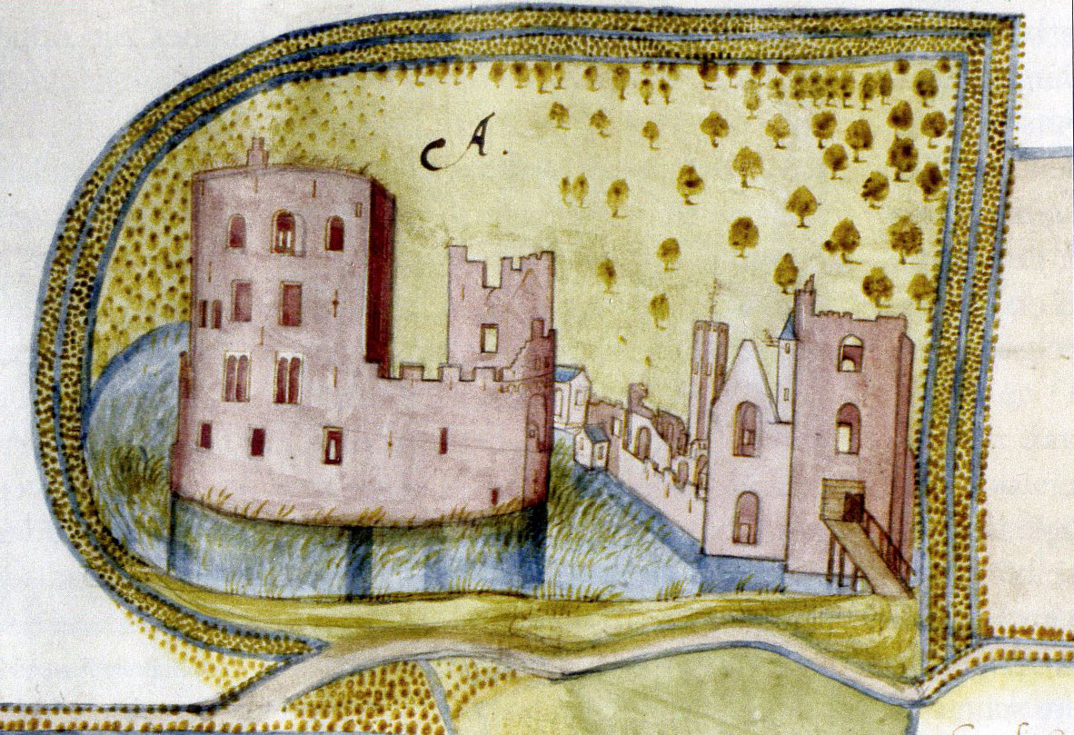 Oudste afbeelding van het slot Teylingen op een kaart van Mr Symon Aerntszoon van Buningen